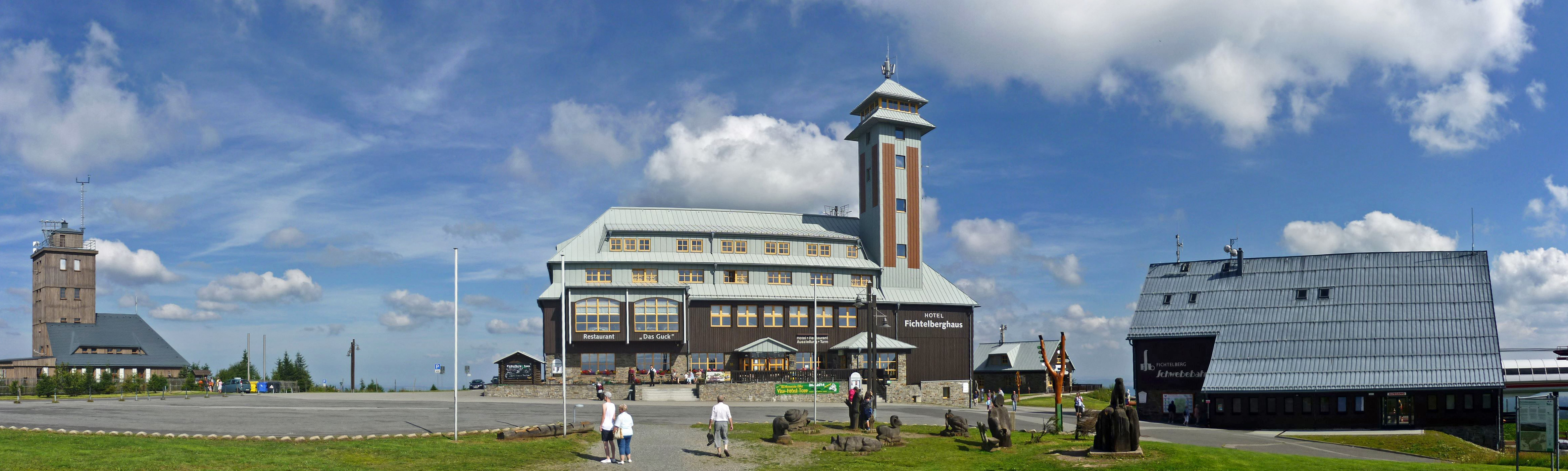 Wetterwarte, Fichtelberghaus und Seilbahnstation auf dem Fichtelberg (1214 m) im Erzgebirge